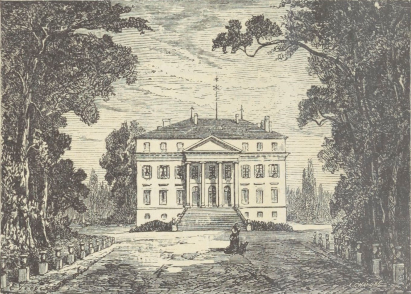 Illustration du Château Margaux dans l'ouvrage Bordeaux et ses vins (7ème édition) de Charles Cocks et Edouard Féret publié en 1898